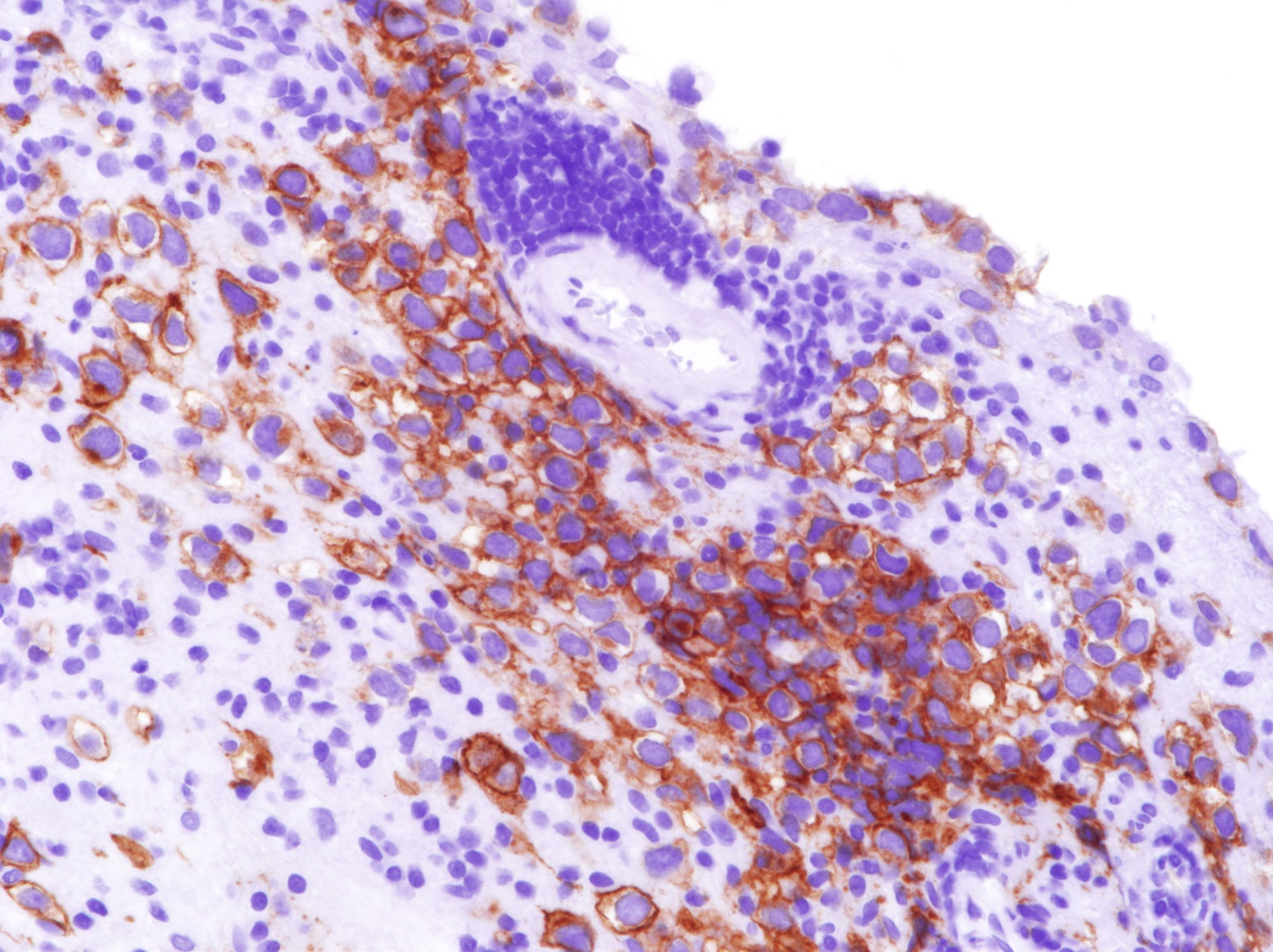 Germinoma Immunohistochemical study(c-kit)